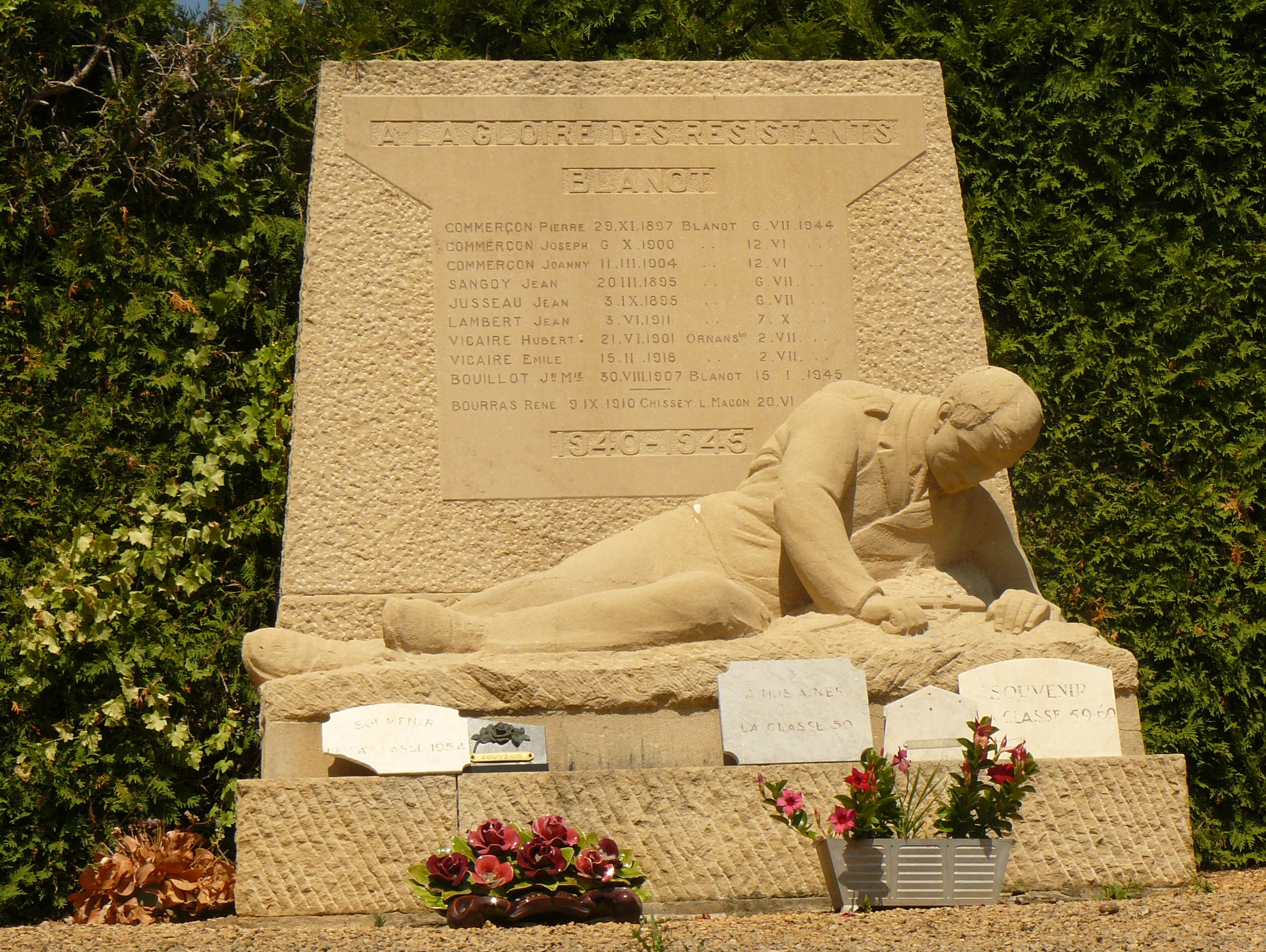 Monument à la mémoire des Résistants de Blanot (Saône-et-Loire)